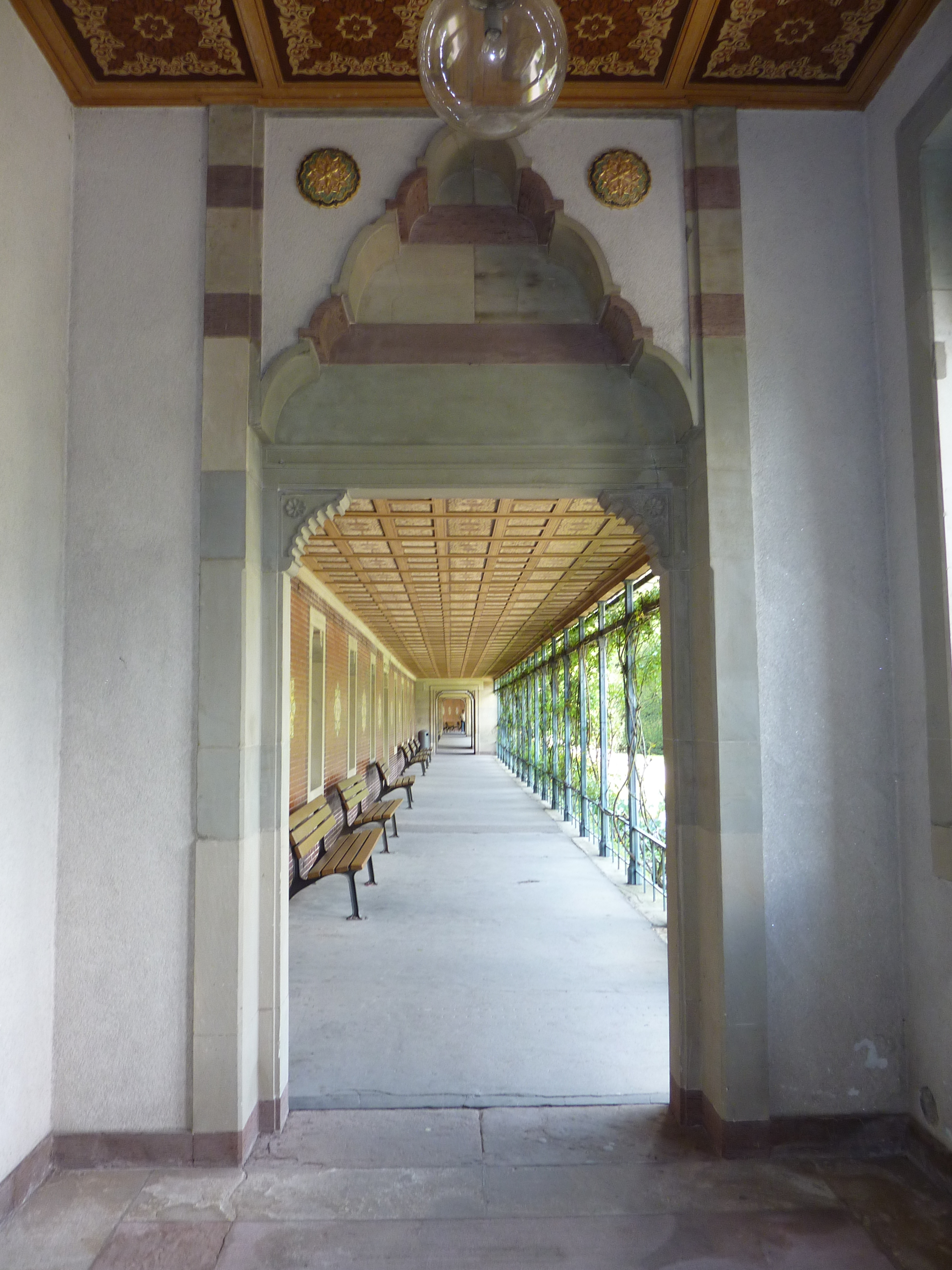 in der Wilhelma